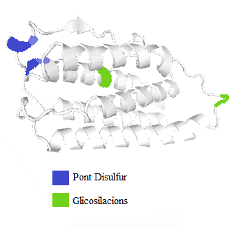 Identificació de les glicosilacions i pont disulfur en l'estructura tridimensional de l'interferó beta-3